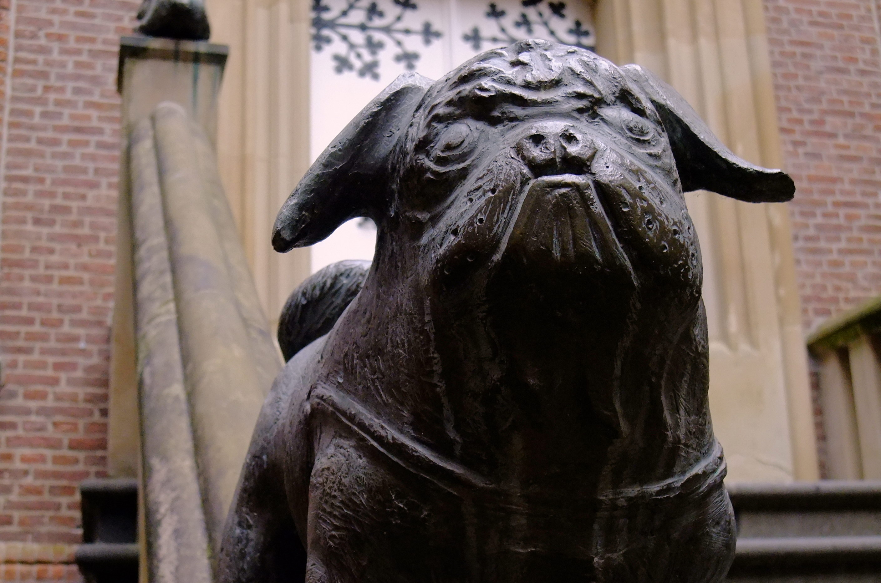 Mopsfigur am Treppenaufgang des Schlosses Moyland, Hans Karl Burgeff